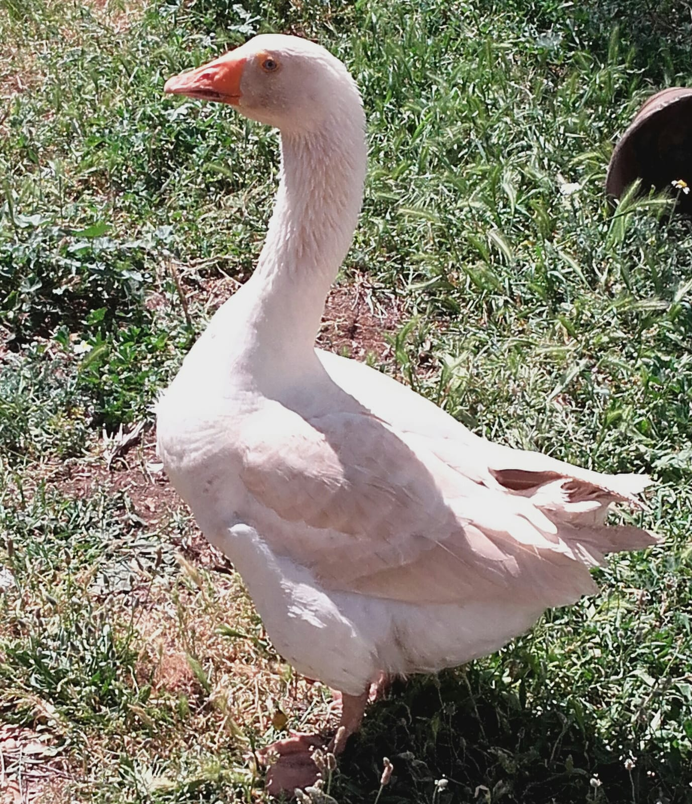 Un esemplare di oca domestica.